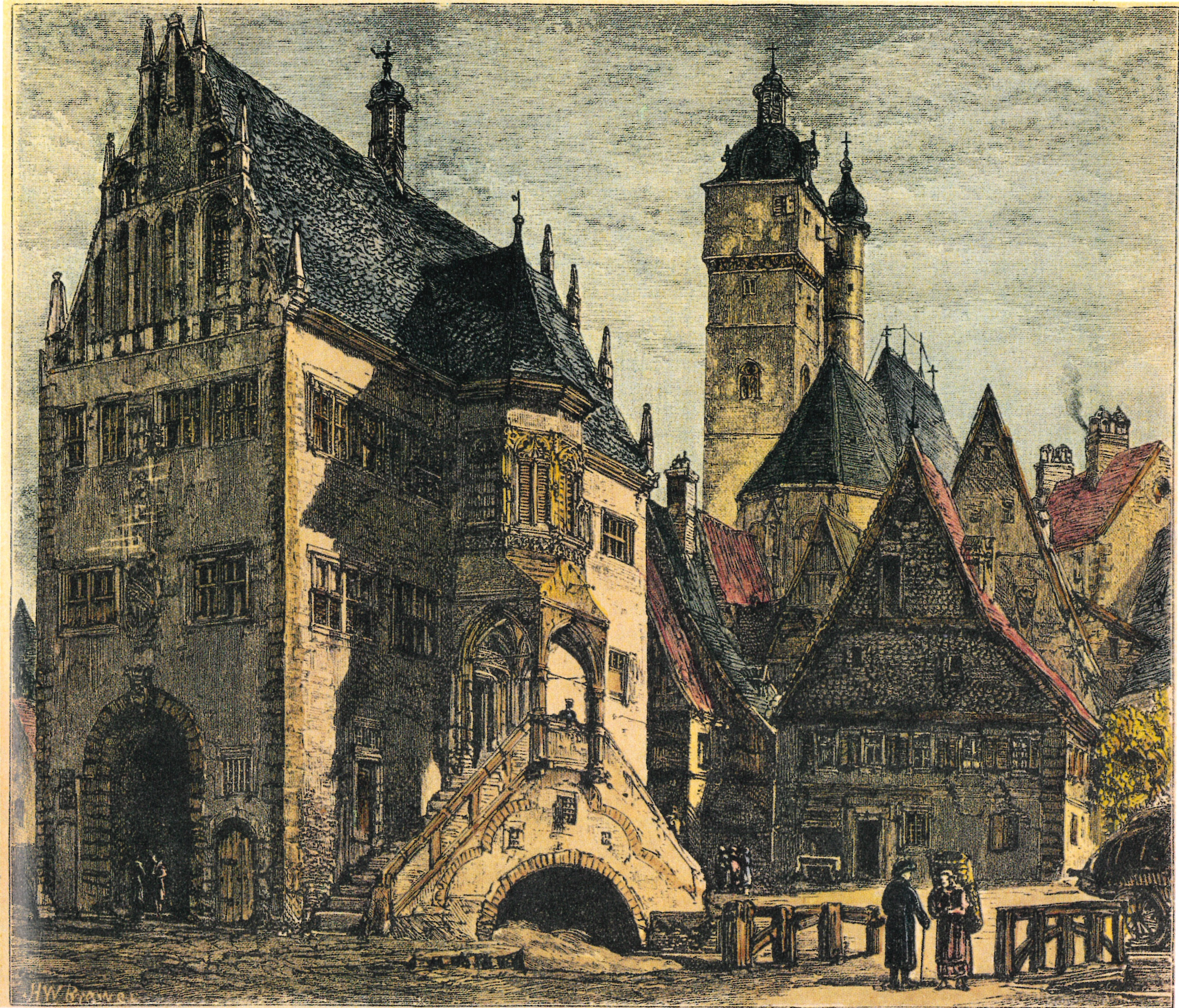 Radierung, Dettelbach (Rathaus mit Rathaussteg) und Stadtpfarrkirche St. Augustinus, von Henry William Brewer, englischer Reisemaler (gest. 1903)